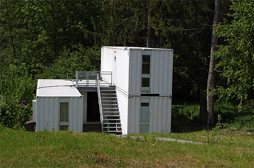 Wohncontainer in Bottmingen